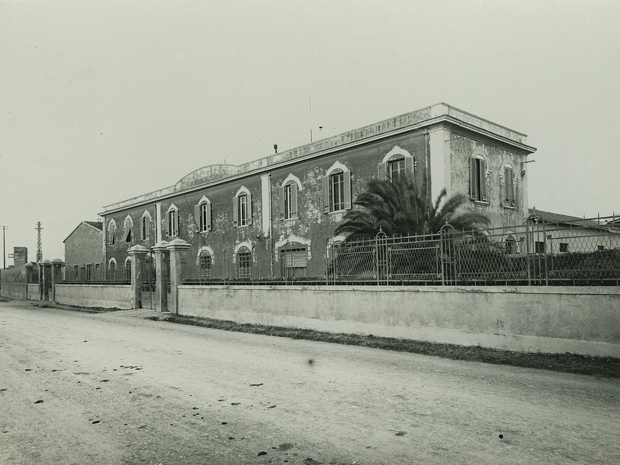 stabilimento SPICA